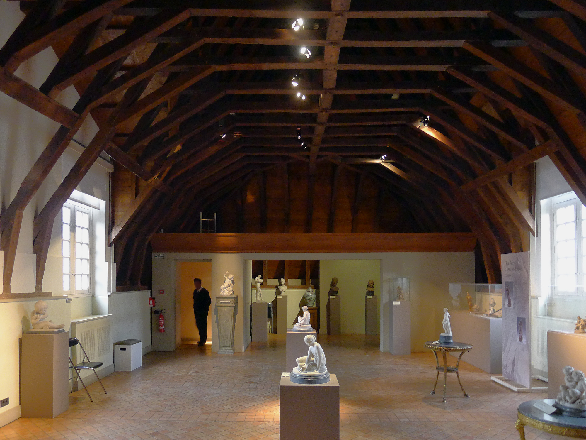 Musée Cognac-Jay (Hôtel de Donon) : salle d'exposition sous le grand comble - Paris III